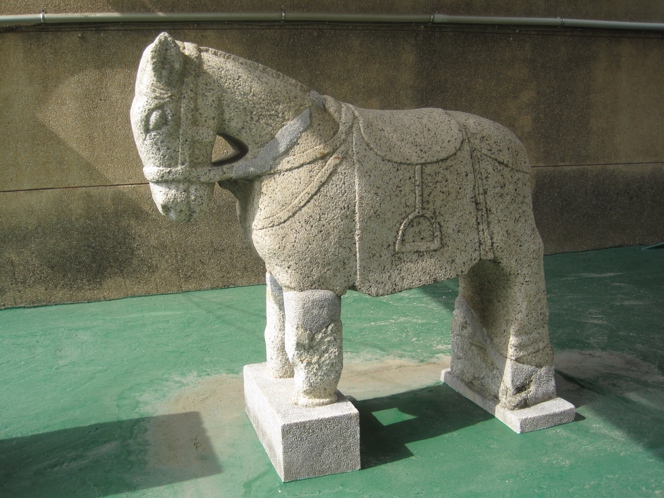 鹽行天后宮石馬，原屬鄭其仁墓。